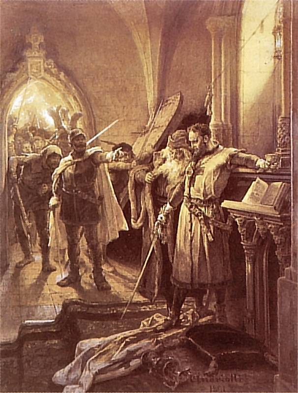 Michał Elwiro Andriolli